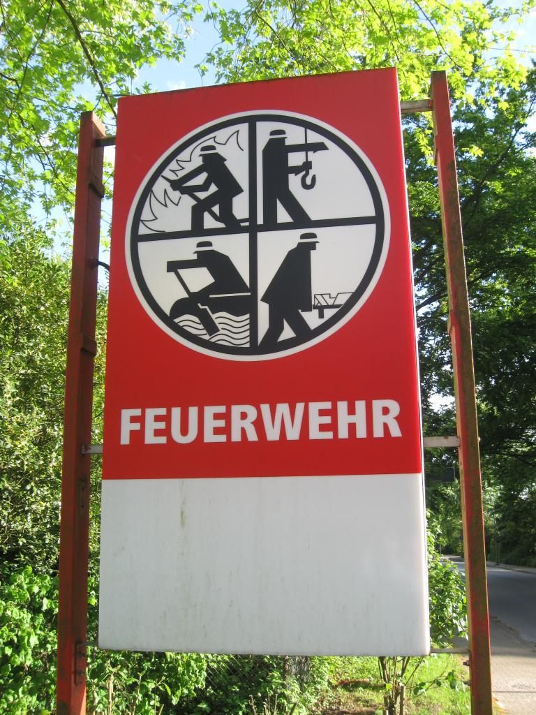 Feuerwehr Gelsenkirchen (Leuchtschild an der Feuerwache 3)